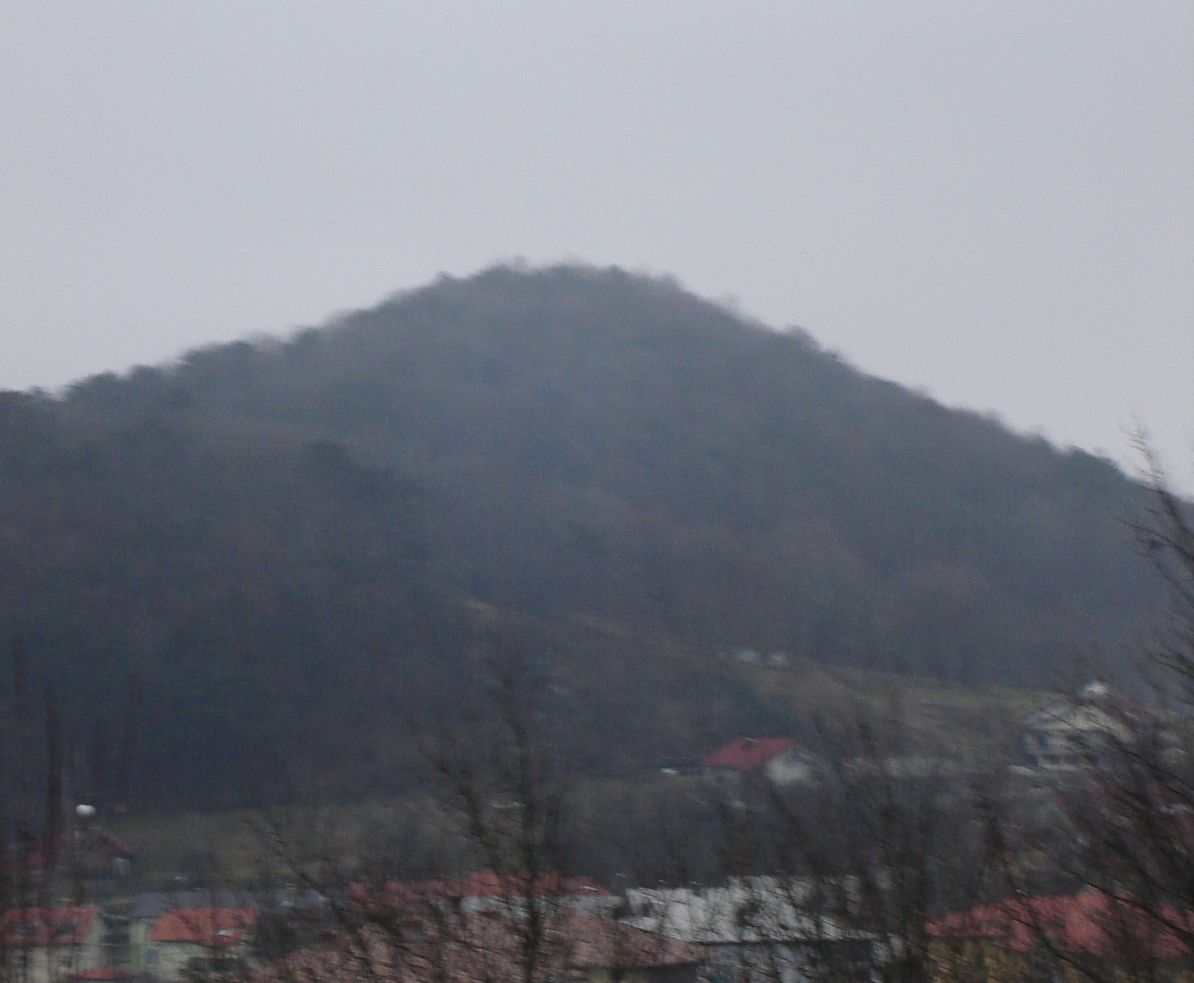 Sovič